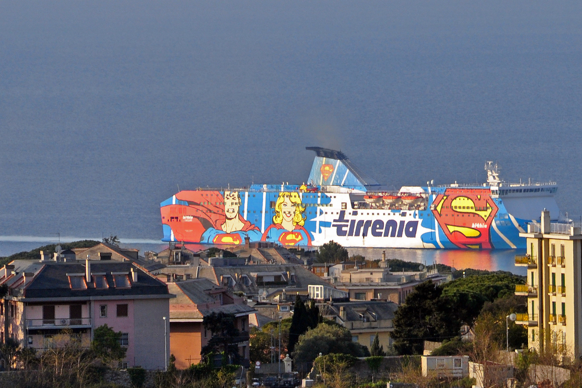 Traghetto Bithia della Tirrenia in navigazione verso il porto di Genova